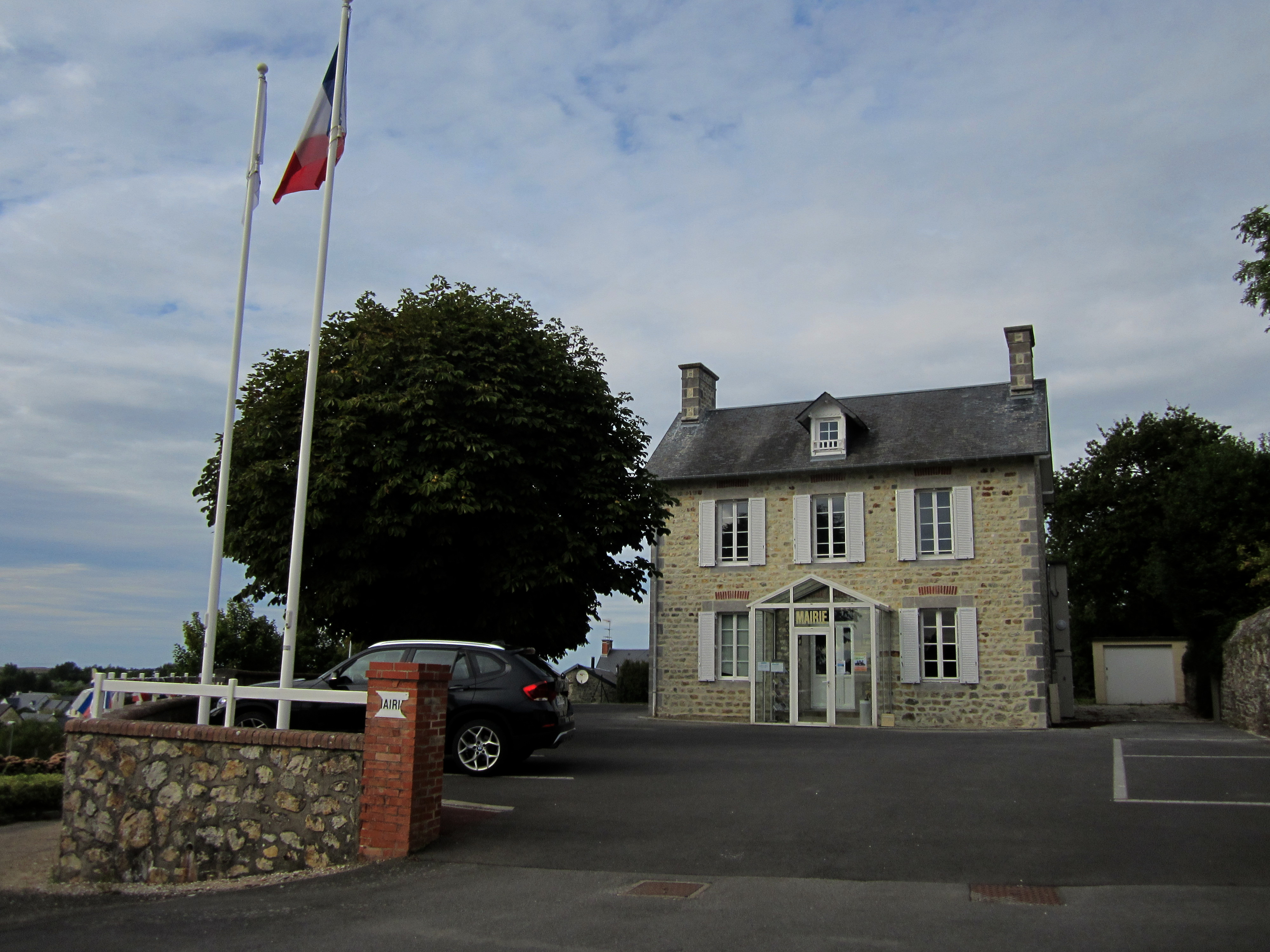 Bréville-sur-Mer, Manche